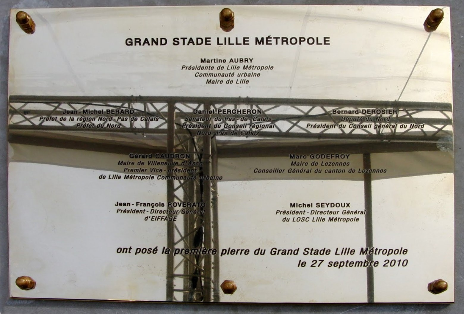 Pose symbolique le 27 septembre 2010 par le président d'Eiffage de la pierre du Stade Pierre-Mauroy est Villeneuve-d'Ascq Nord.-Hauts-de-France .